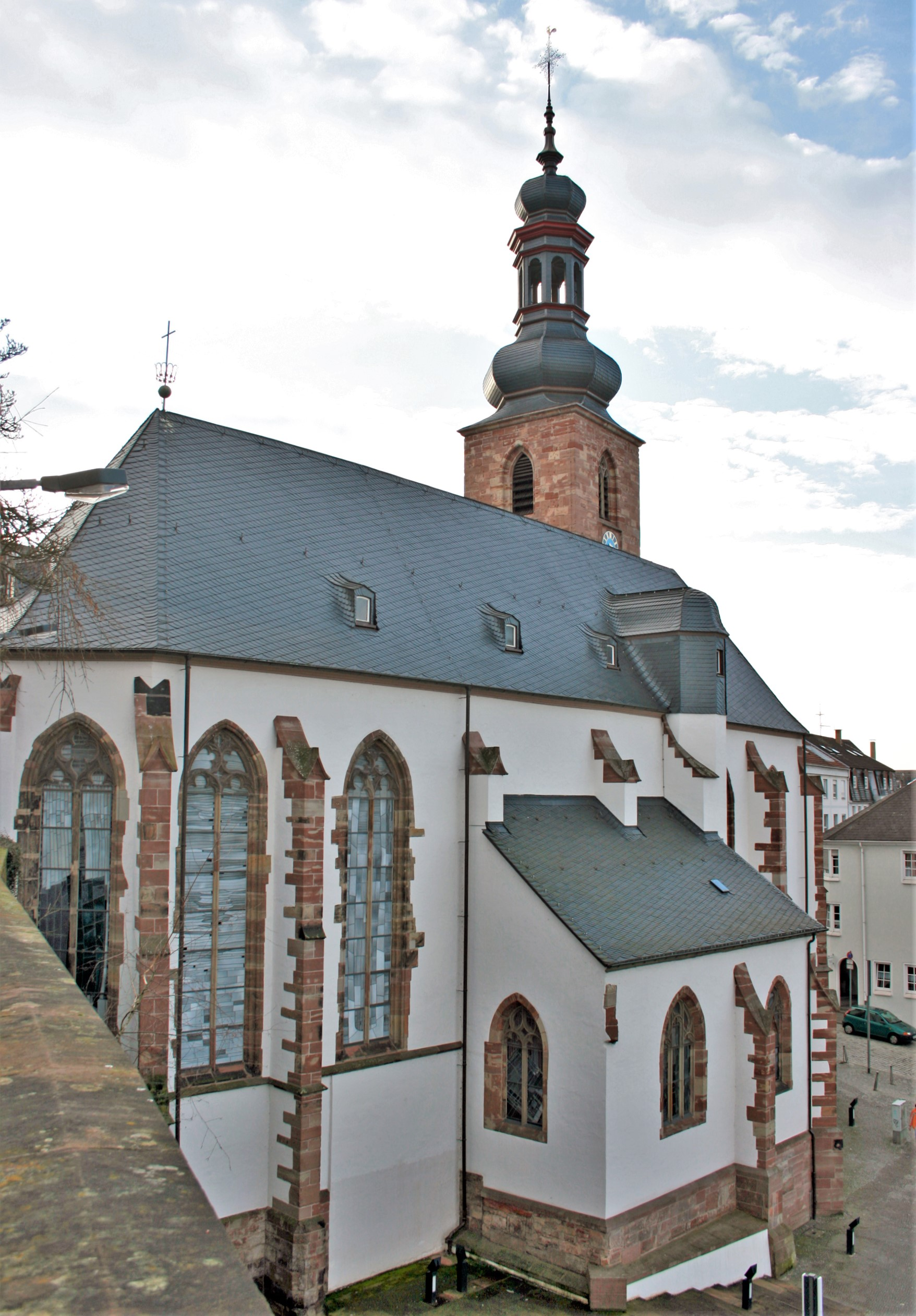 Saarbrücker Schloss - Schlosskirche